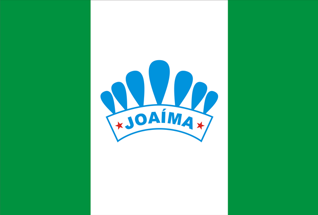 Desenhada por Mauro Castro.